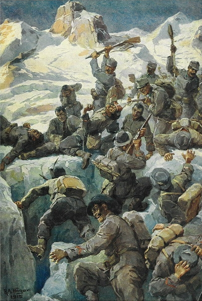 Abwehrkampf an der Cima Presena (Trentino)